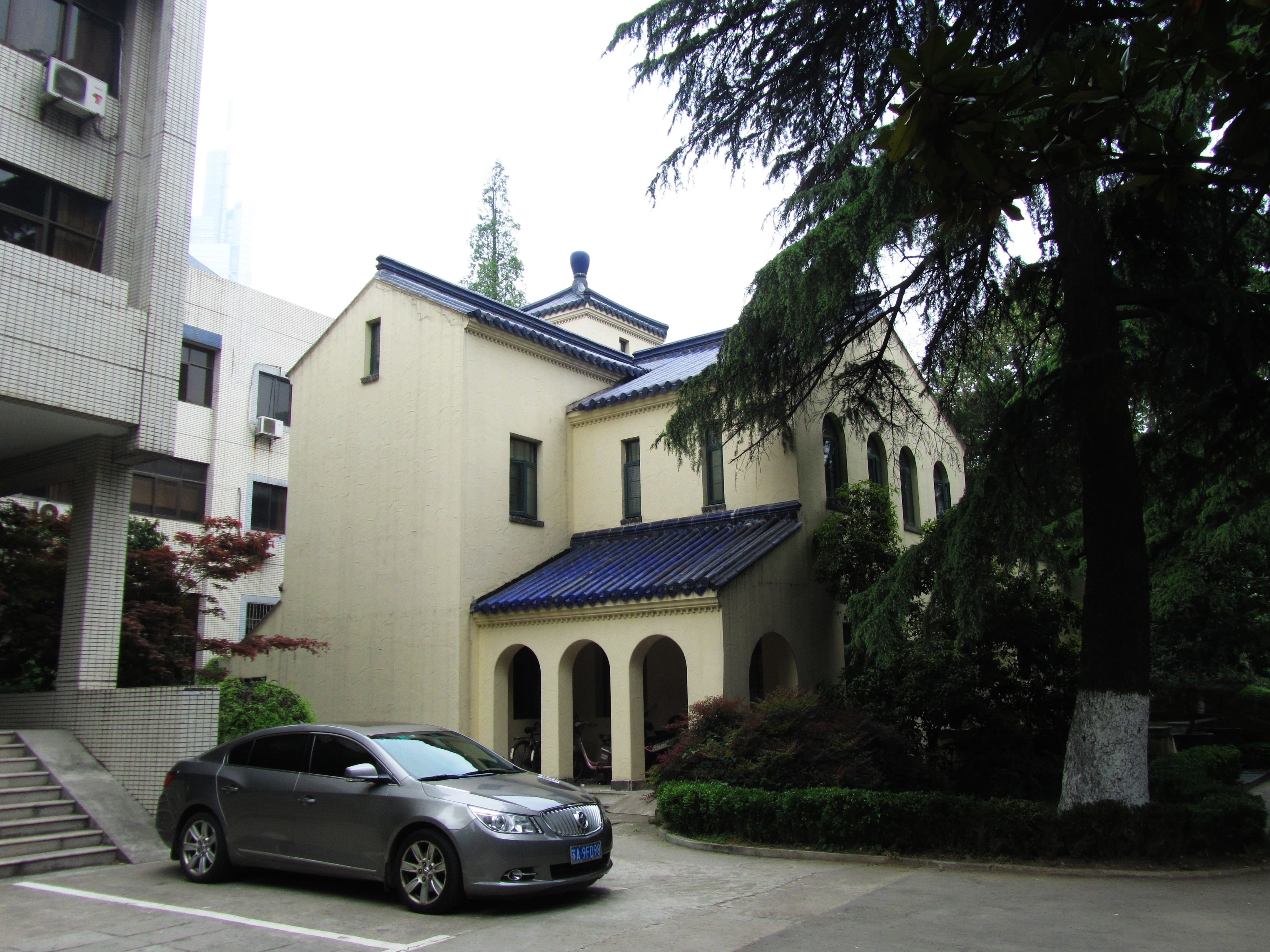 南京斗鸡闸何应钦公馆，西南侧。